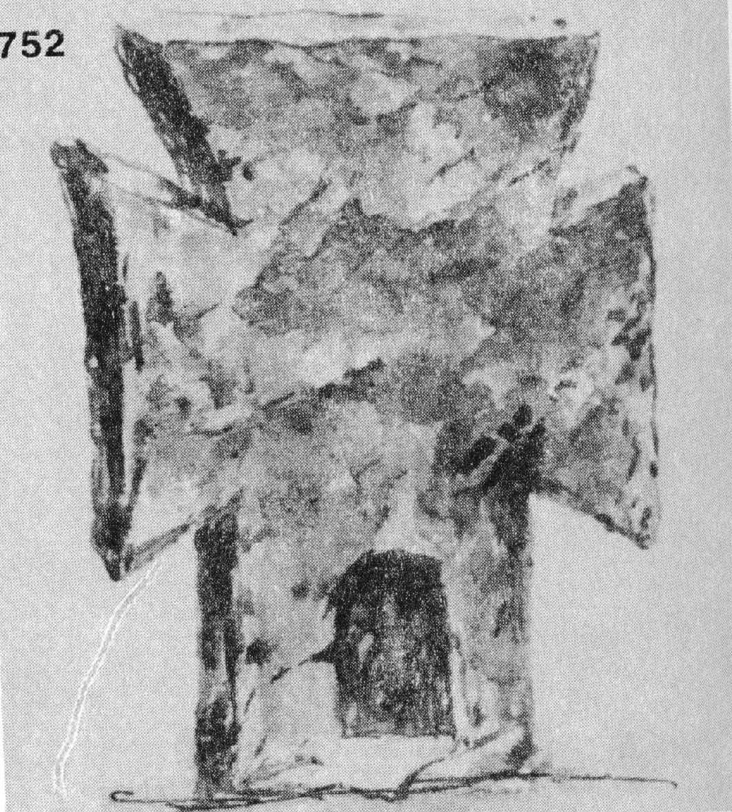 Кръст - надгробен паметник, из двора на църквата „Св. Димитър" в гр. Гостивар. Издялан през 1840 г. (надпис и дата върху надгробната, хоризон­тално положена плоча). Четирикрилен; горните му три крила са трапецовидни, а долното четвъртито. В основата върху лицето му е издълбана ниша за кандило. Издялан е грубо от варовит туф, забит е до саркофага. Скициран на 29.X.1915 г. (Т. 8, обр. 36.)